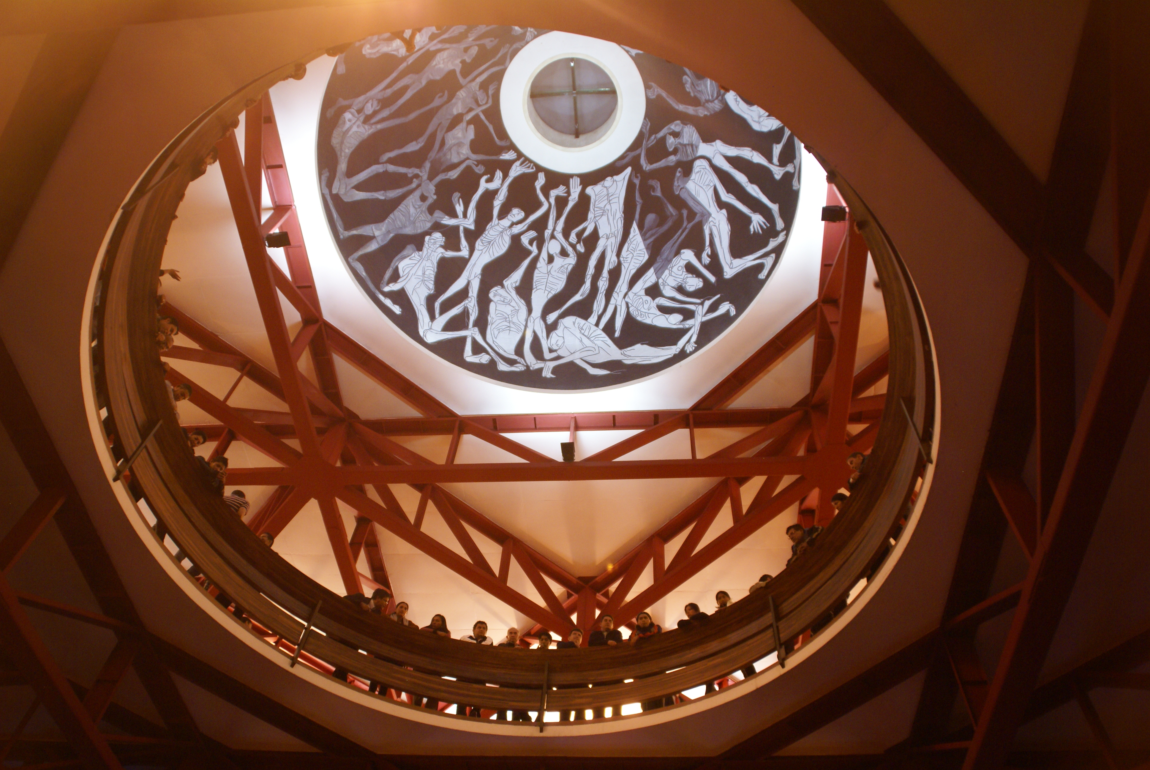 Capilla del Hombre, Quito-Ecuador 10 de febrero de 2011